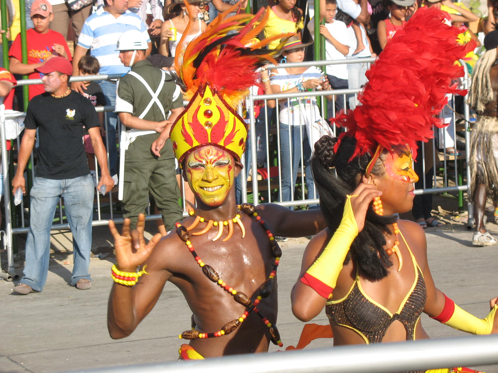 Bailarines del Carnaval de Barranquilla